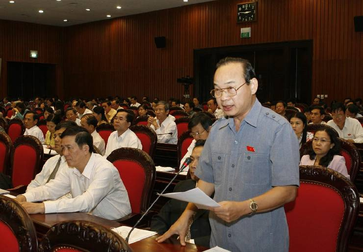 Đại biểu Quốc hội Tỉnh Nghệ An Hoàng Trần Ky đang phát biểu ý kiến.